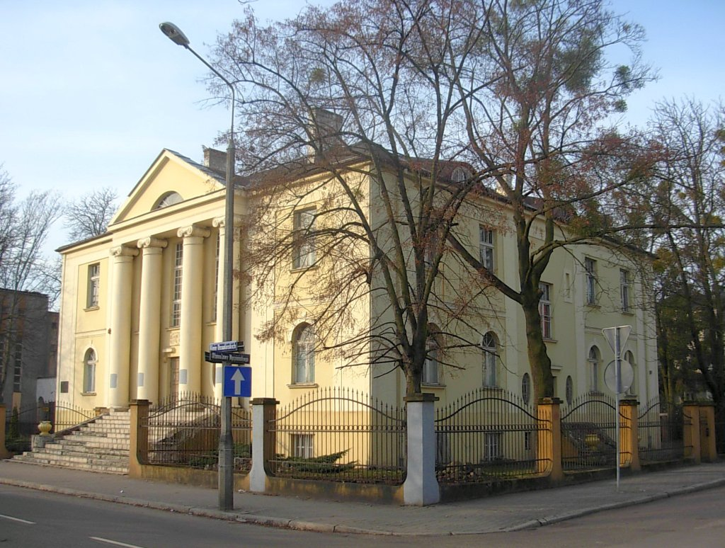 Aleja Ossolińskich 7 w Bydgoszczy